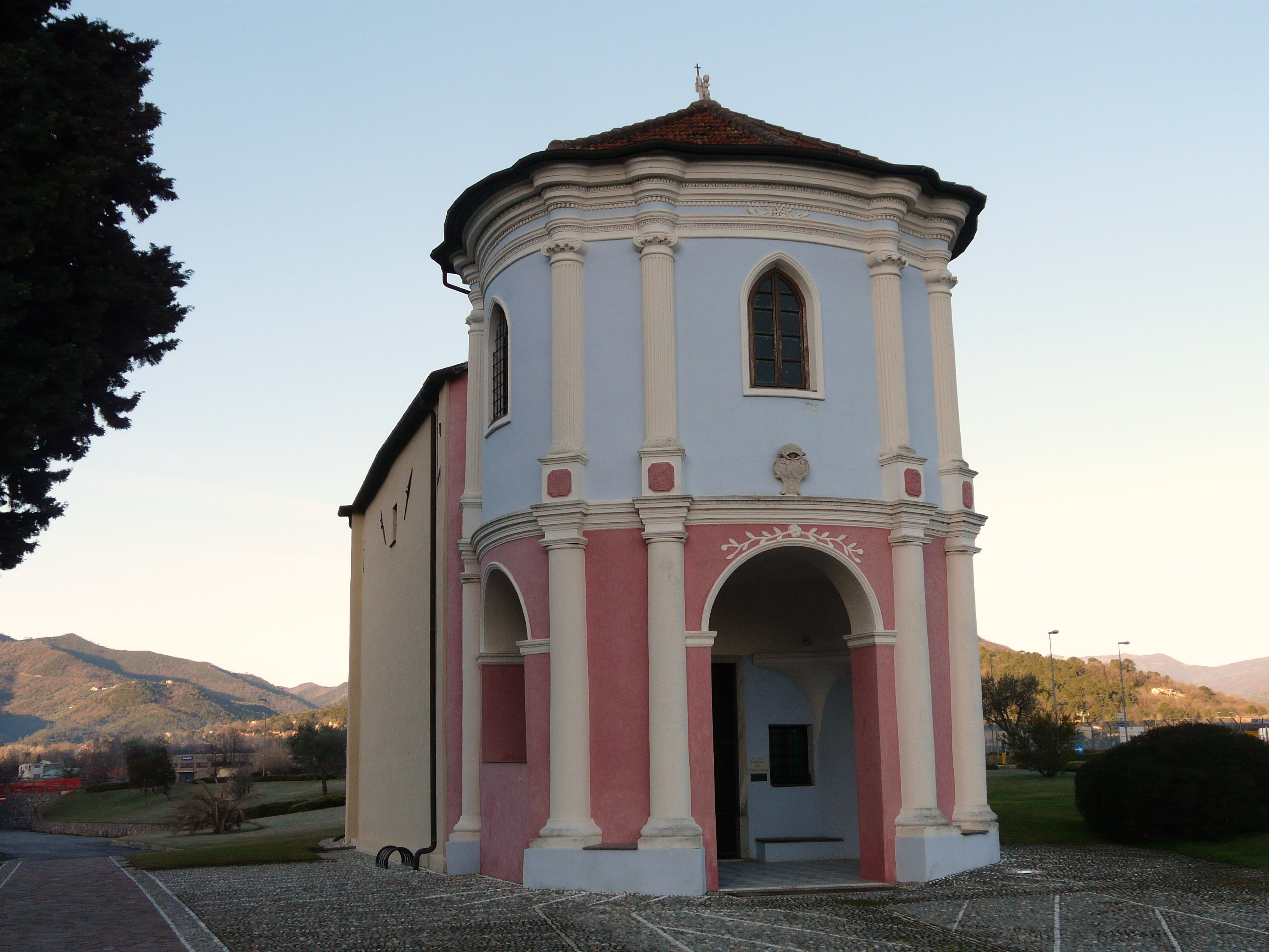 Santuario di Nostra Signora delle Grazie, Villanova d'Albenga, Liguria, Italia